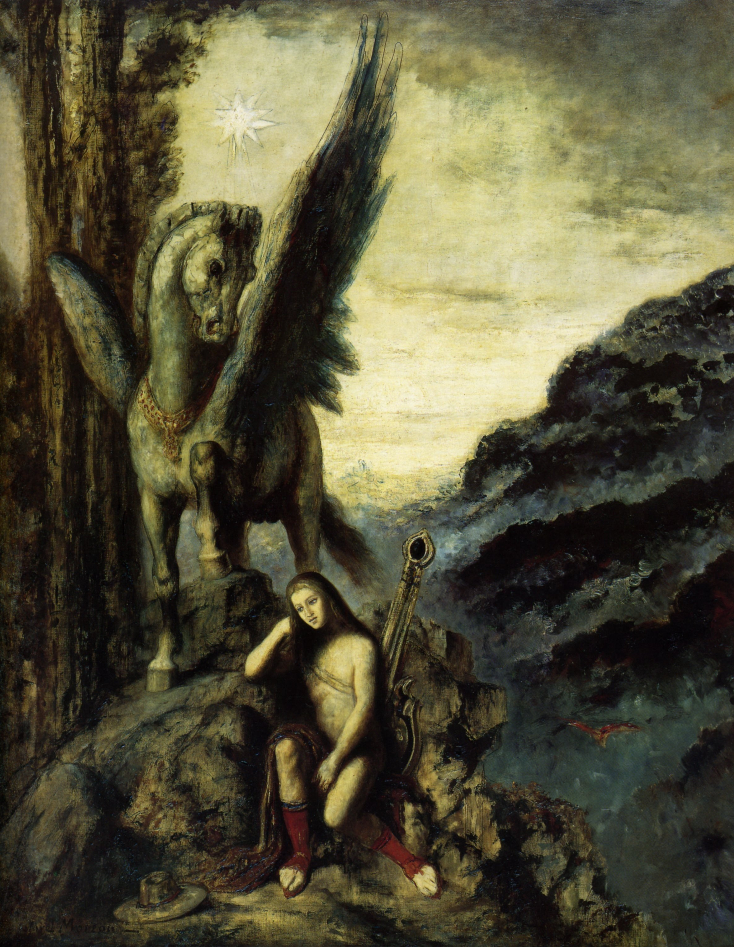 the travelling poetlabel QS:Len,"the travelling poet" label QS:Lde,"der reisende Dichter" label QS:Lfr,"Le Poète voyageur"